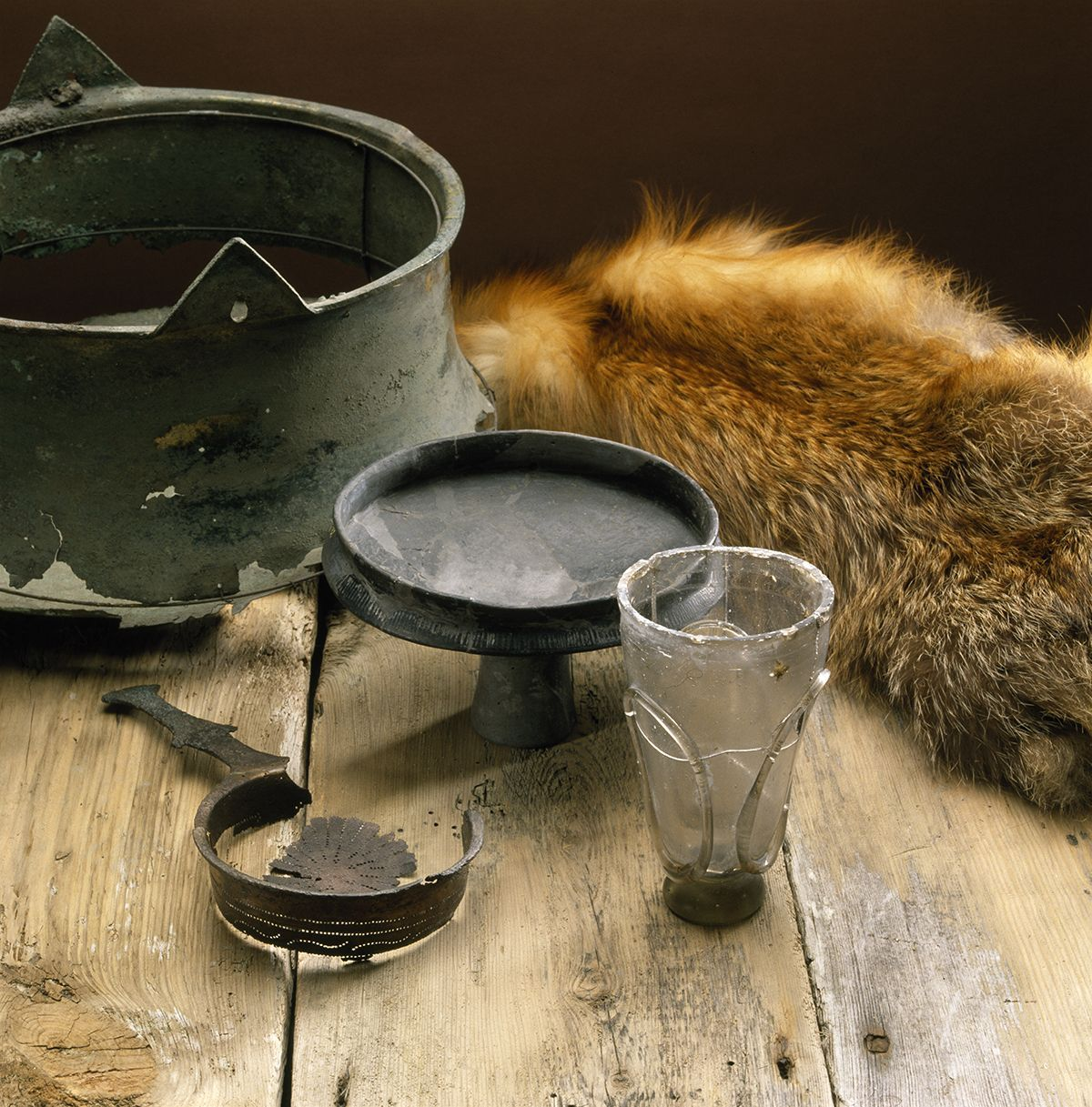 Bronsekar, fotskål, glassbeger og vinsil fra romertid, funnet på Gjeite, Svedjan og Salthammer i Nord-Trøndelag, alle fra ca. 0-400 e. Kr.